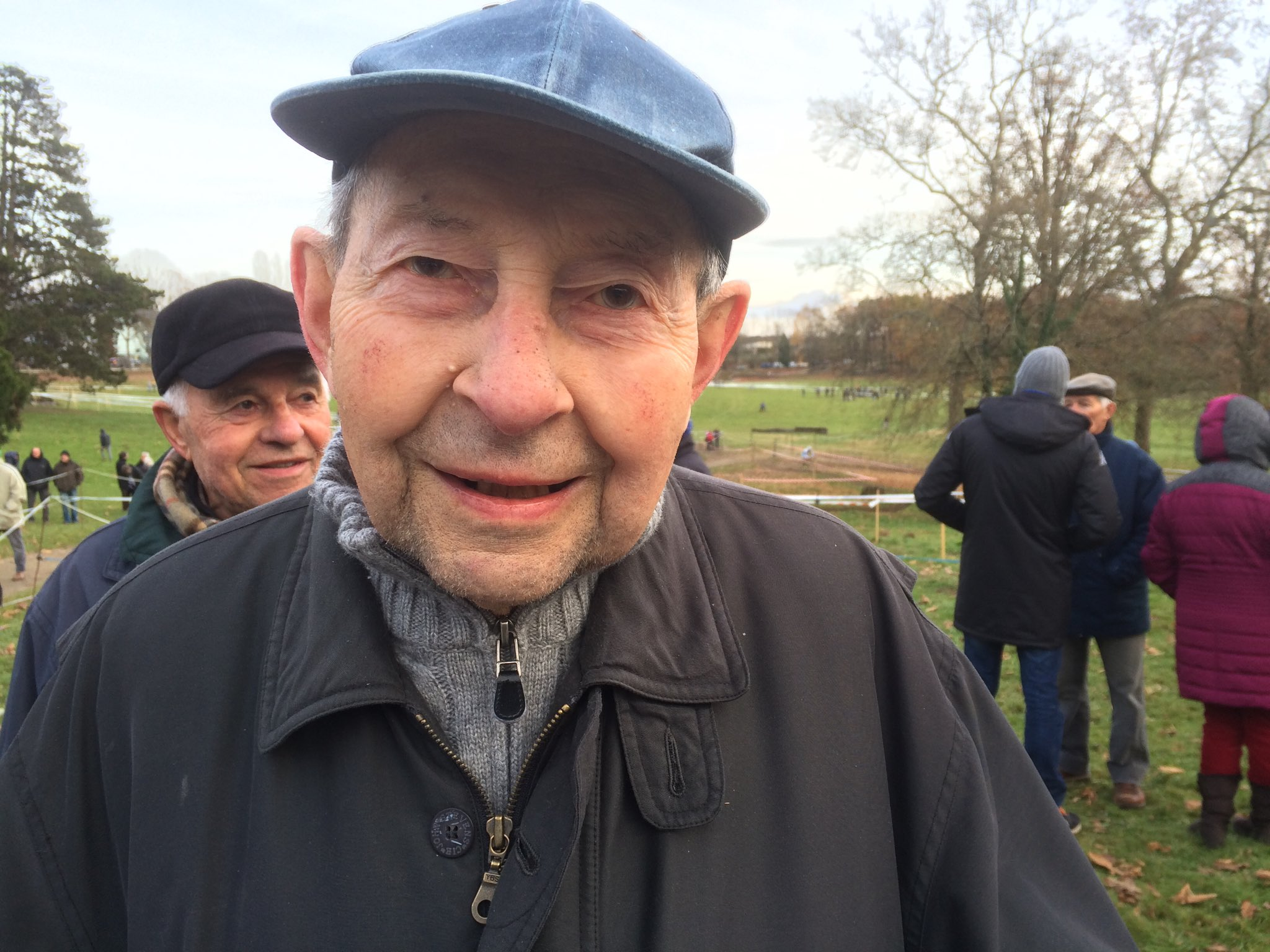 L'ex champion se déplace encore sur les courses cyclistes de la région de Limoges